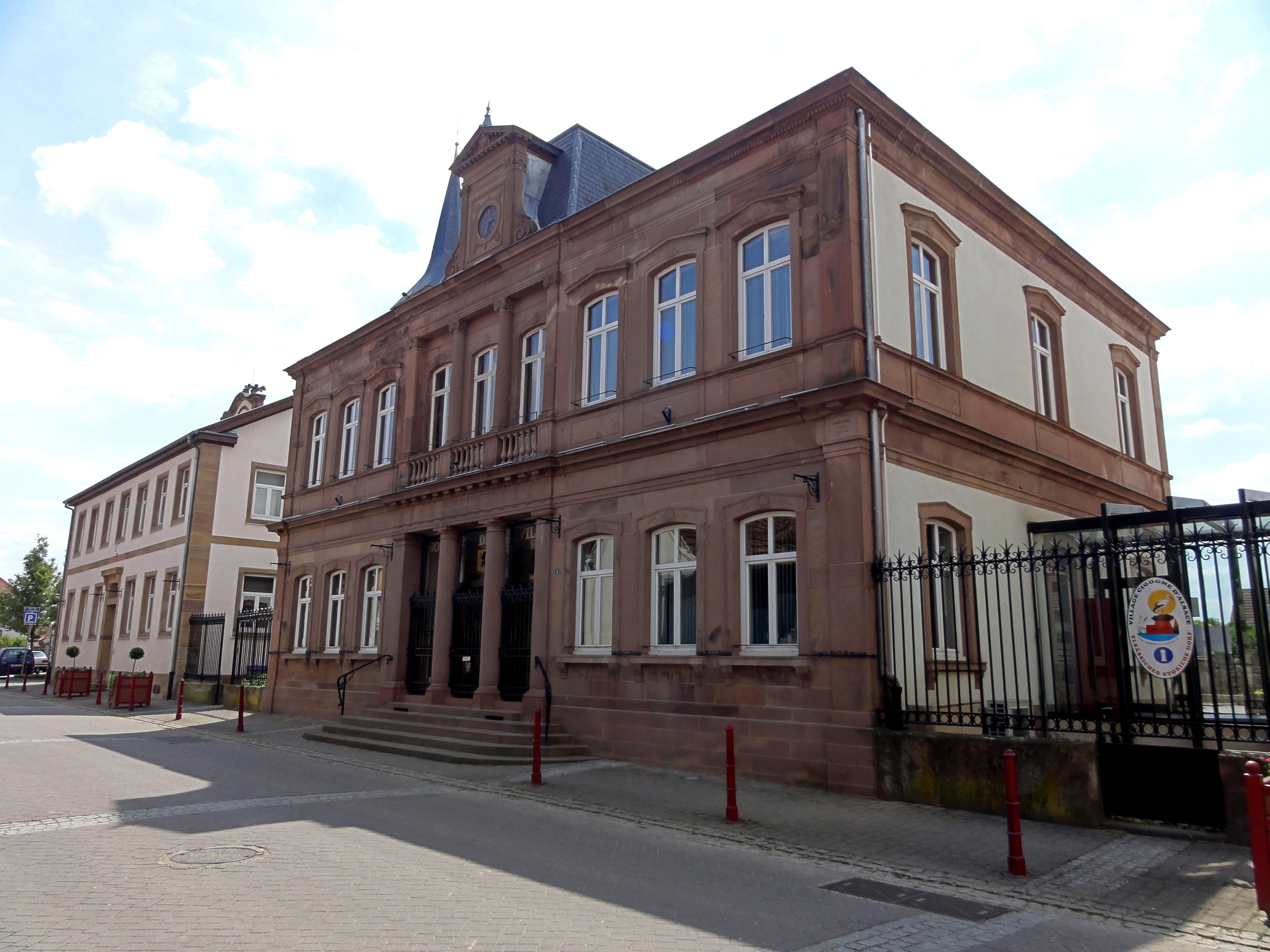 Alsace, Bas-Rhin, Geispolsheim, Hôtel de ville (XIXe ?)